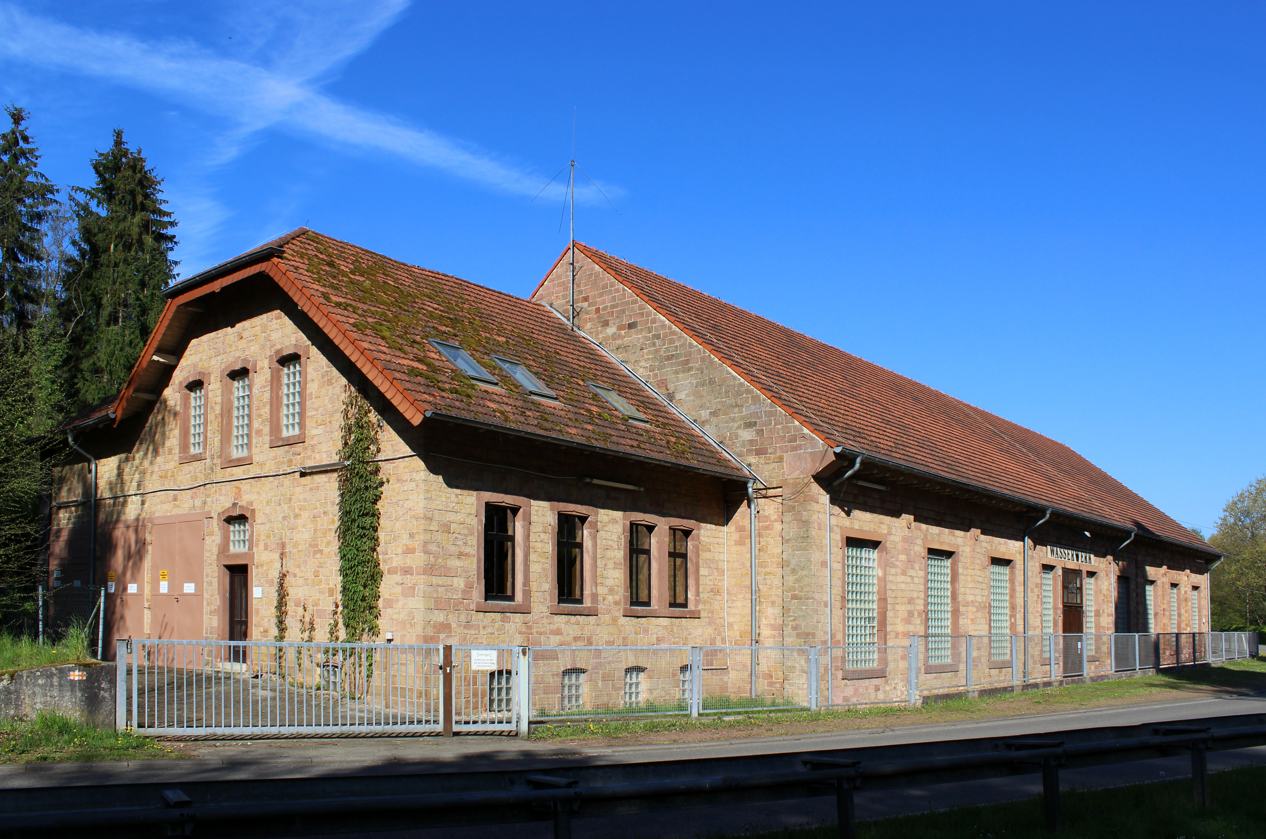 Wasserwerk, Spiesermühltal, Saarland